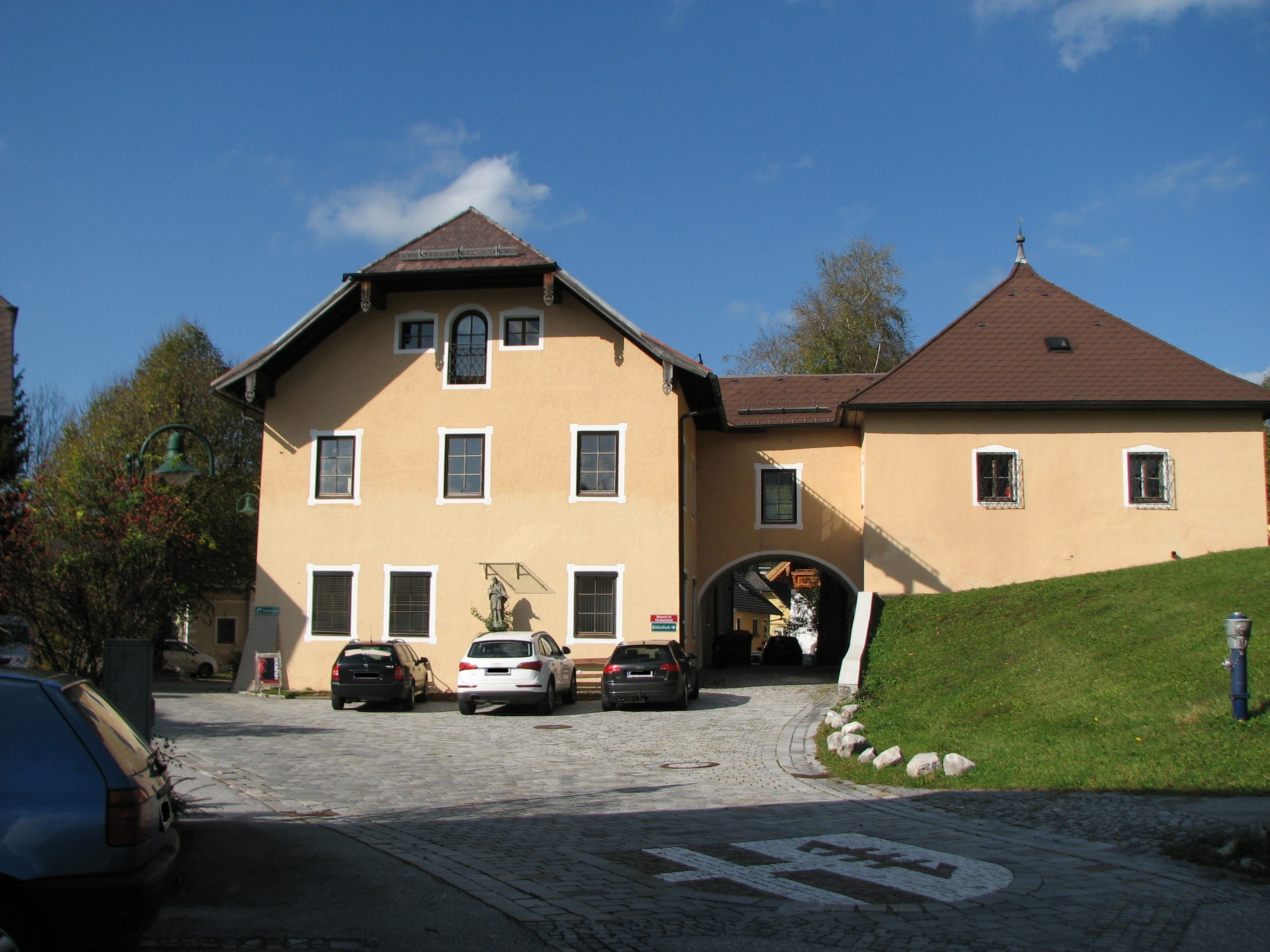 Gemeindehaus, Fürstenstöckl, Heimatmuseum, ehem. Schmelzhütte